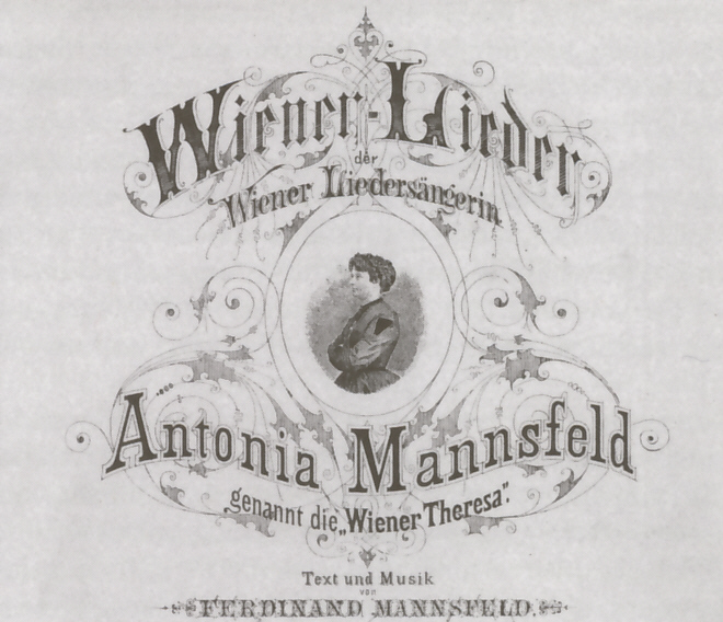 Antonie Mansfeld (1835-1875)